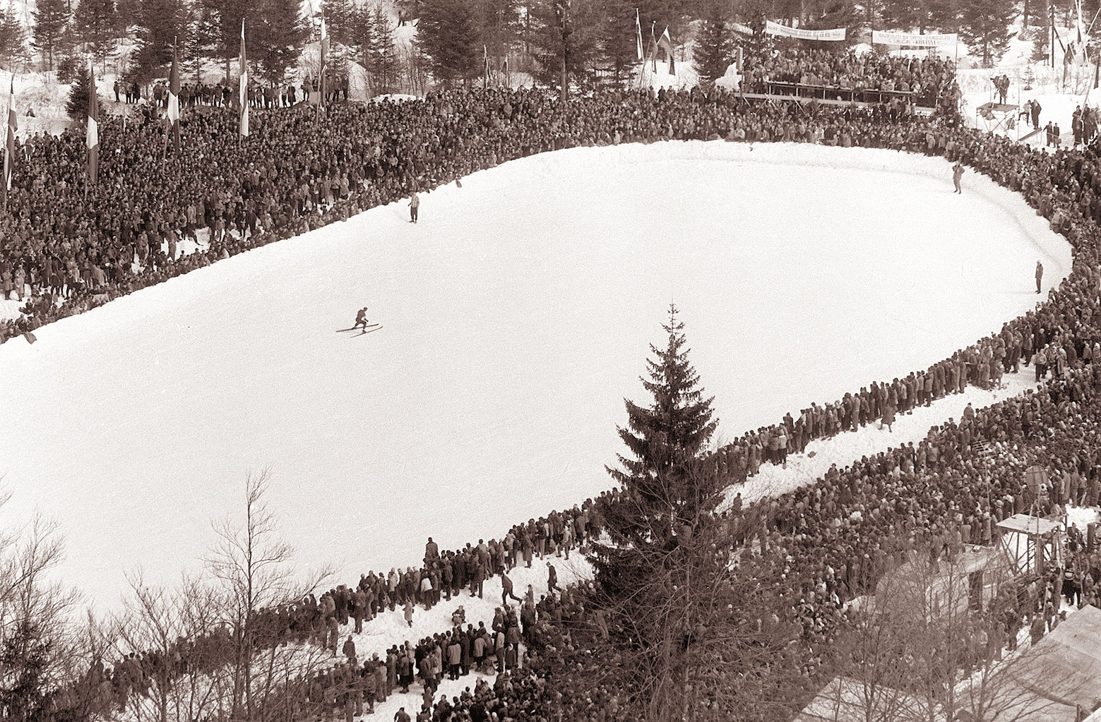 Tekma ob 25-letnici planiške mamutske skakalnice, sobota